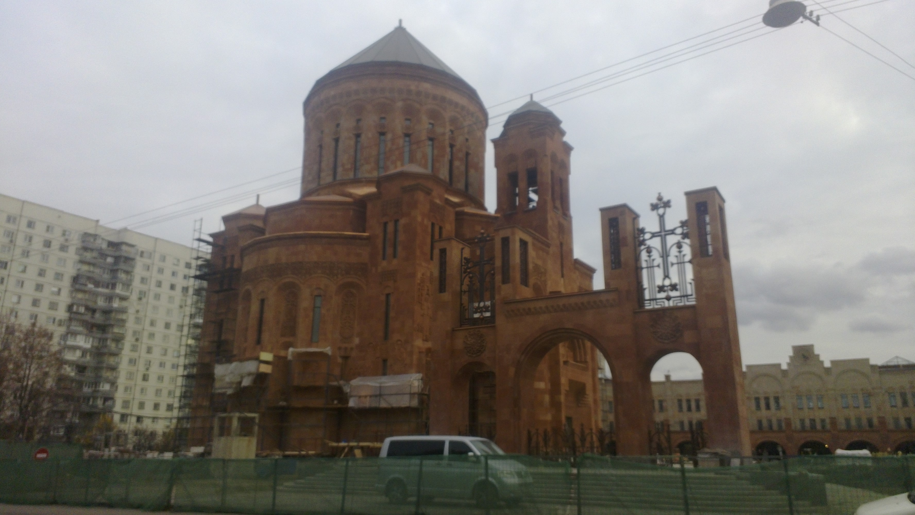 Ռուսաստան, Մոսկվա: Տրիֆոնովսկայա փողոցում գտնվող Հայկական վանքային համալիր: Սուրբ Խաչ մայր տաճարը Տրիֆոնովսկայա փողոցից: Unknown